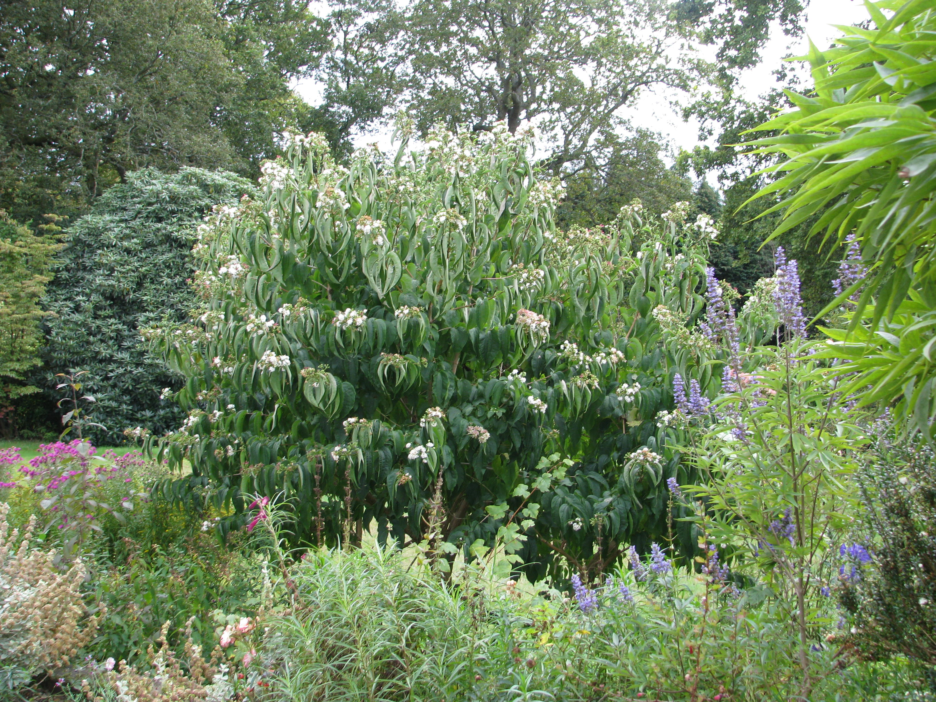 Heptacodium miconioides